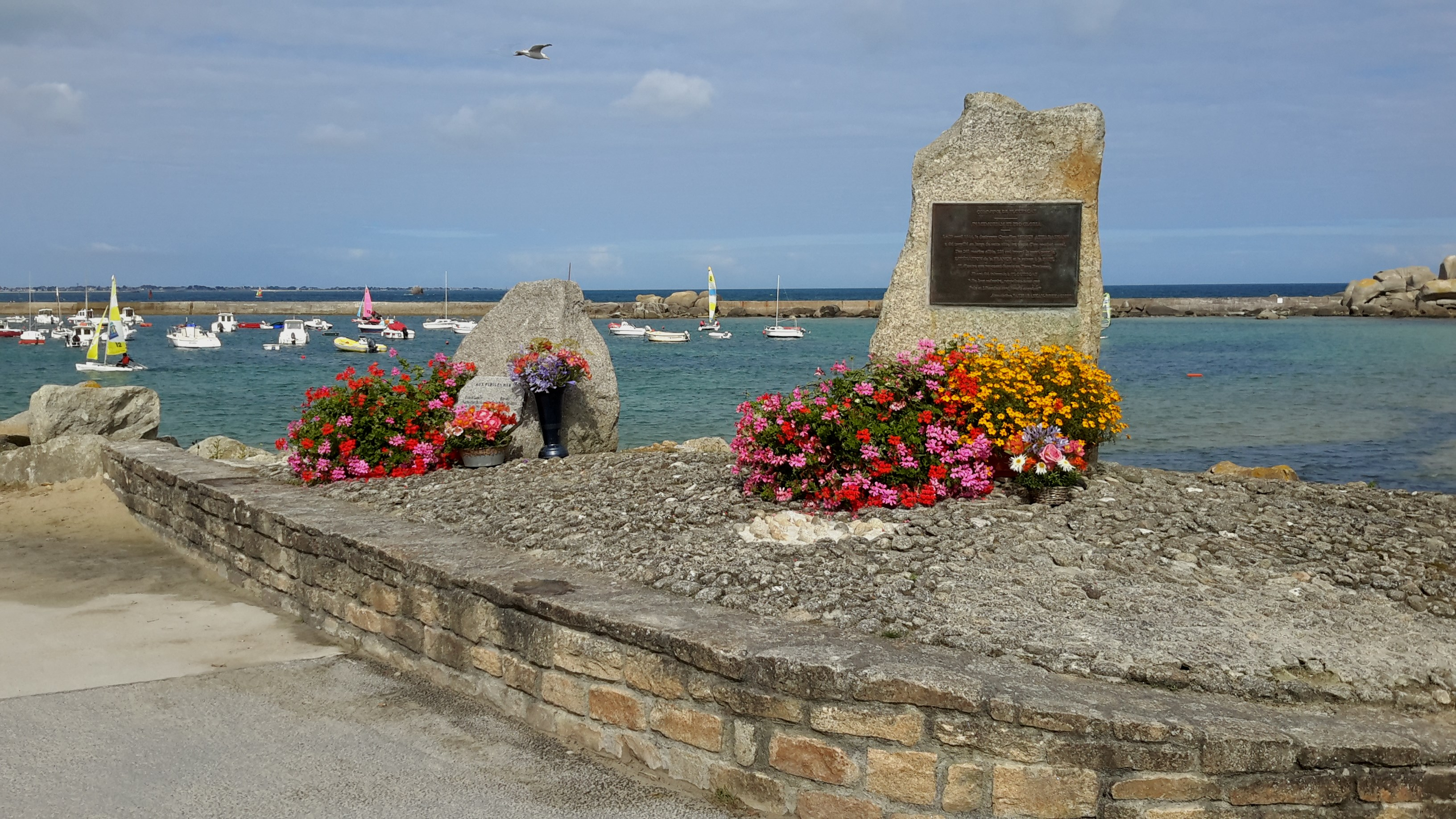 Port de Porsguen, Plouescat, Finistère, France.